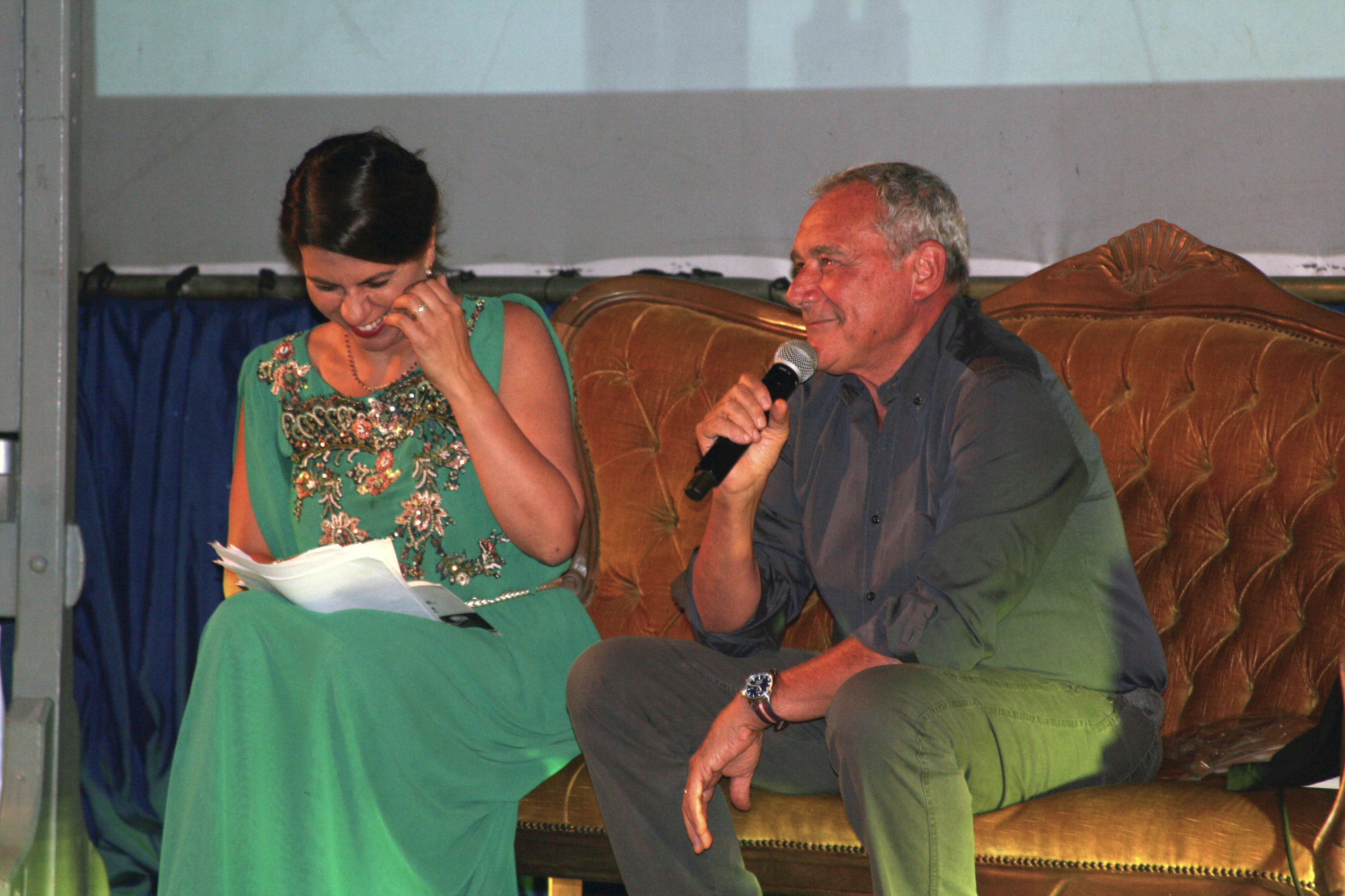 Geppi Cucciari dialoga con il presidente del Senato Pietro Grasso in occasione del festival letterario "Sulla terra leggeri" a Sassari.